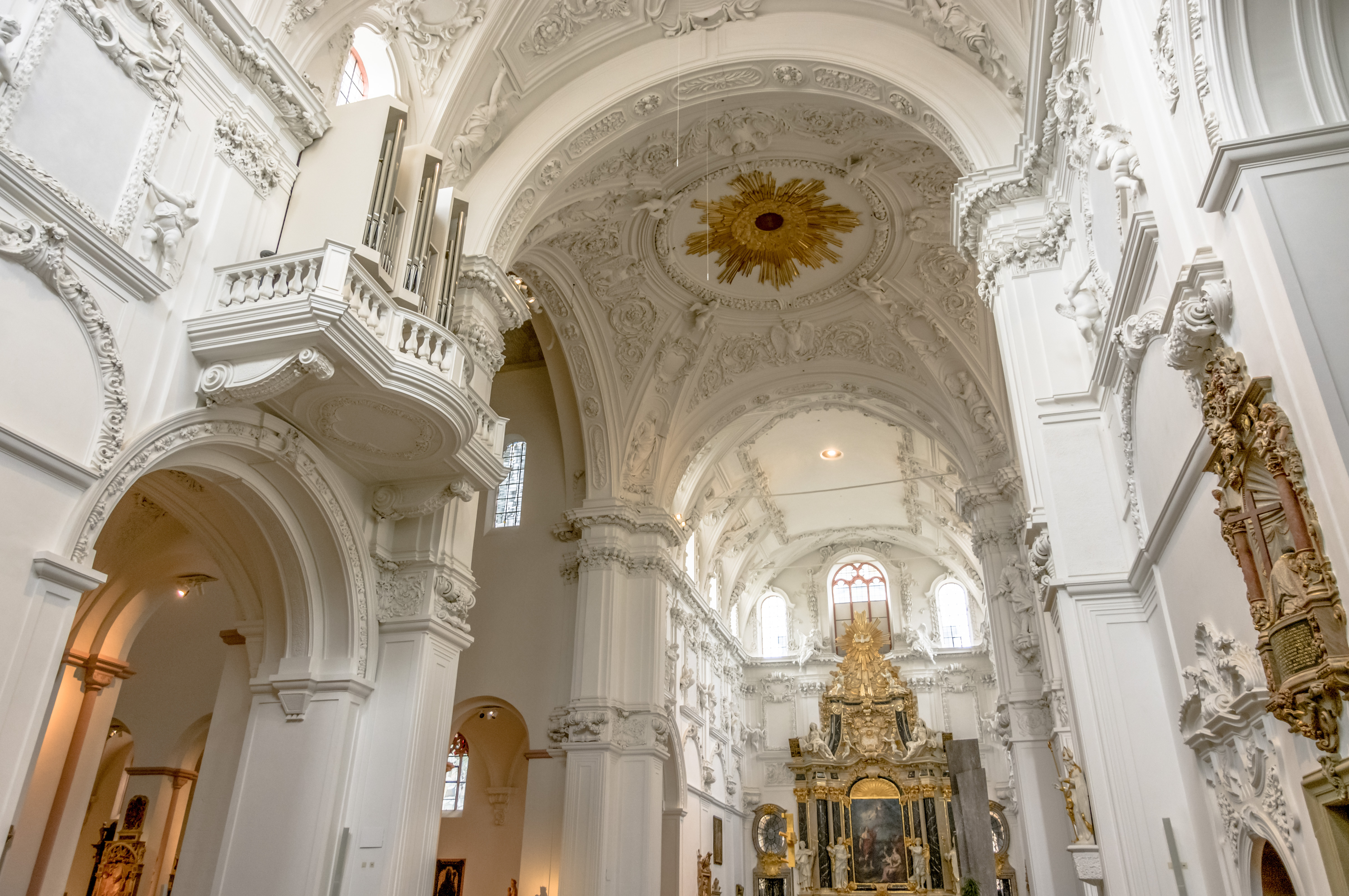 Würzburg Dom St. KilianThis is a photograph of an architectural monument.